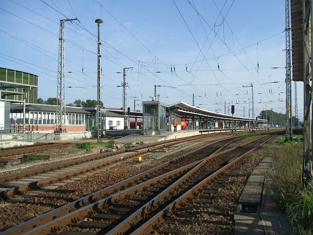 Stralsund, Germany, Hauptbahnhof Gleisanlagen